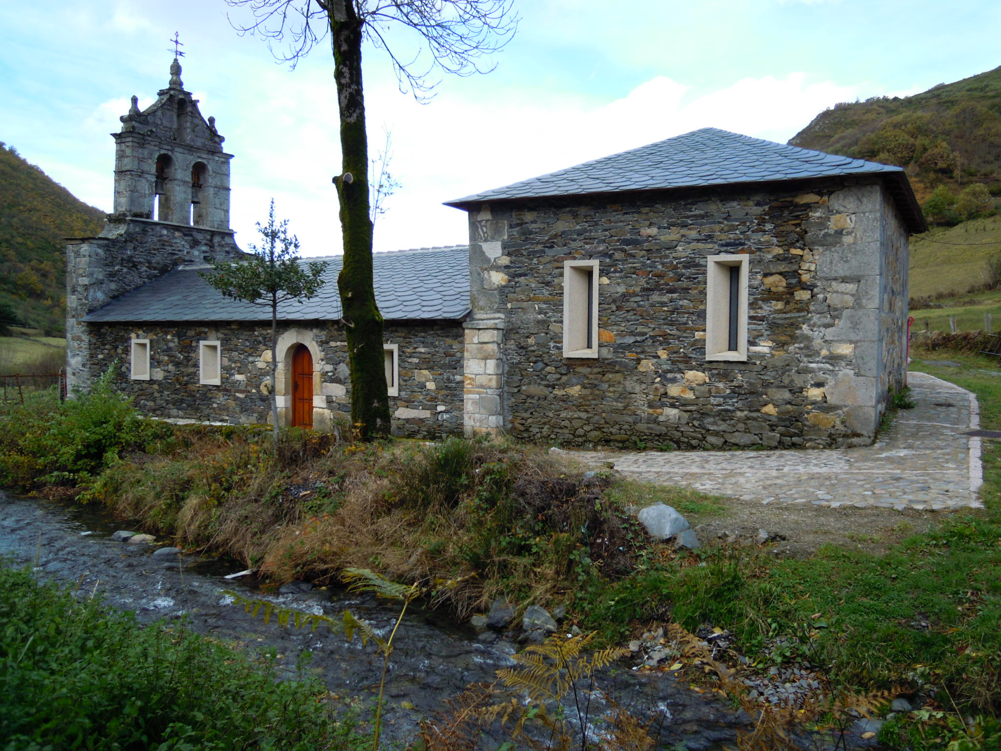 Igrexa parroquial de Valouta (Candín, provincia de León)